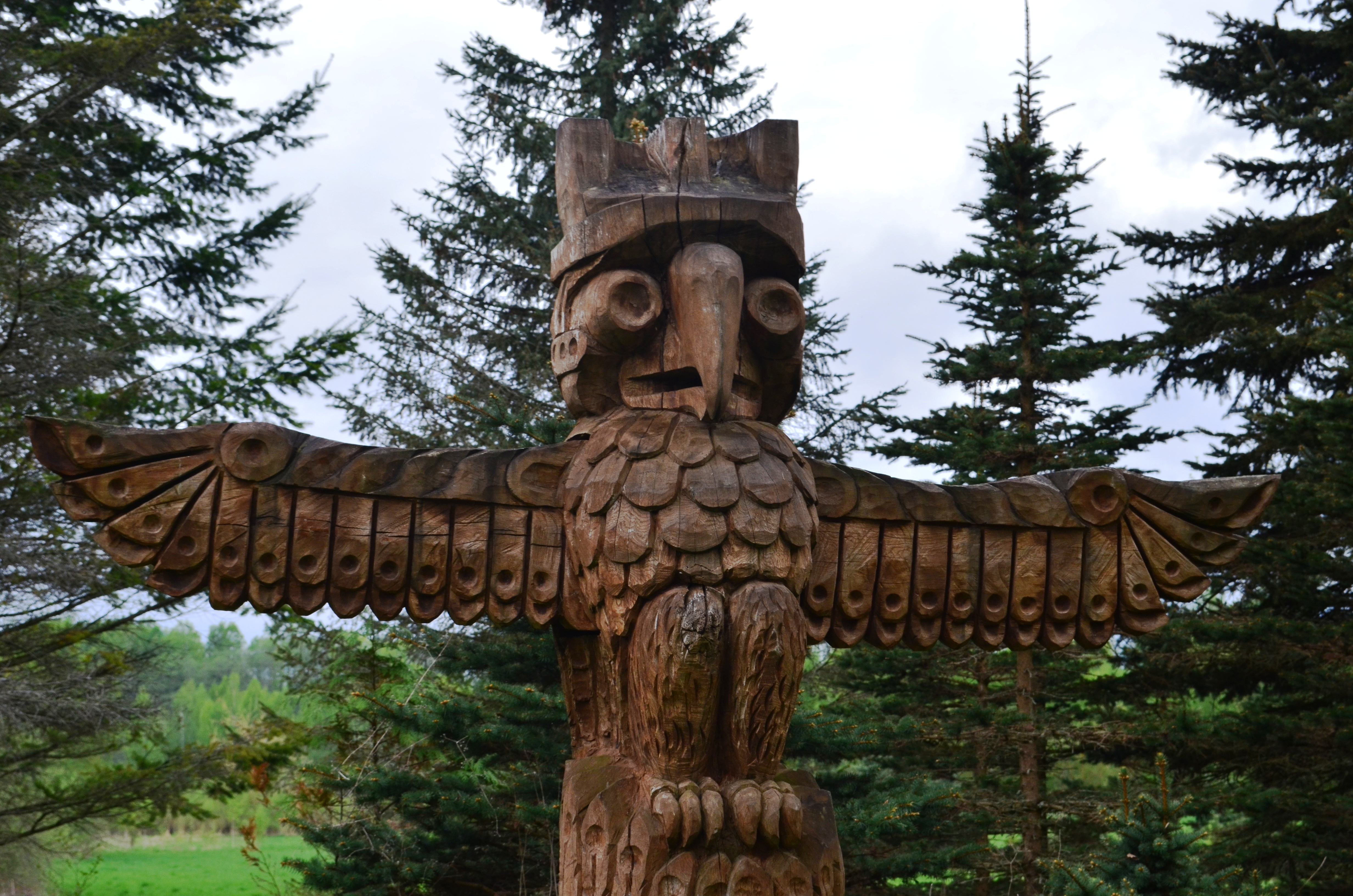 Skinderiško dendroparkas. Kėdanių r.